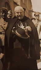 l'Arcivescovo di Cagliari Ernesto Maria Piovella, immagine tratta da questa: Il Monsignor E.M. Piovella ed il Colonnello Sardus Fontana.png